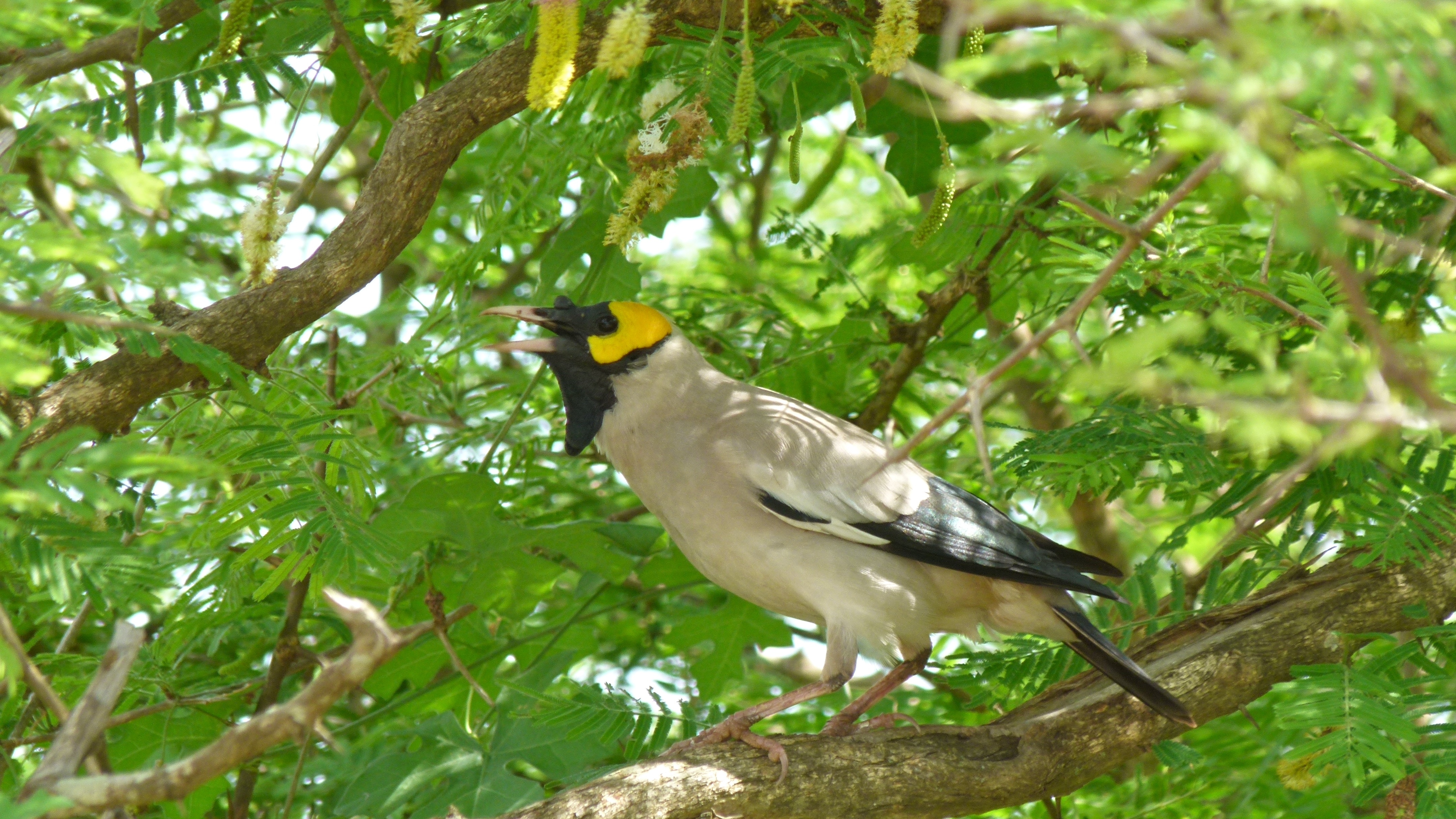 S34 West of Tshokwane, Kruger NP, SOUTH AFRICA